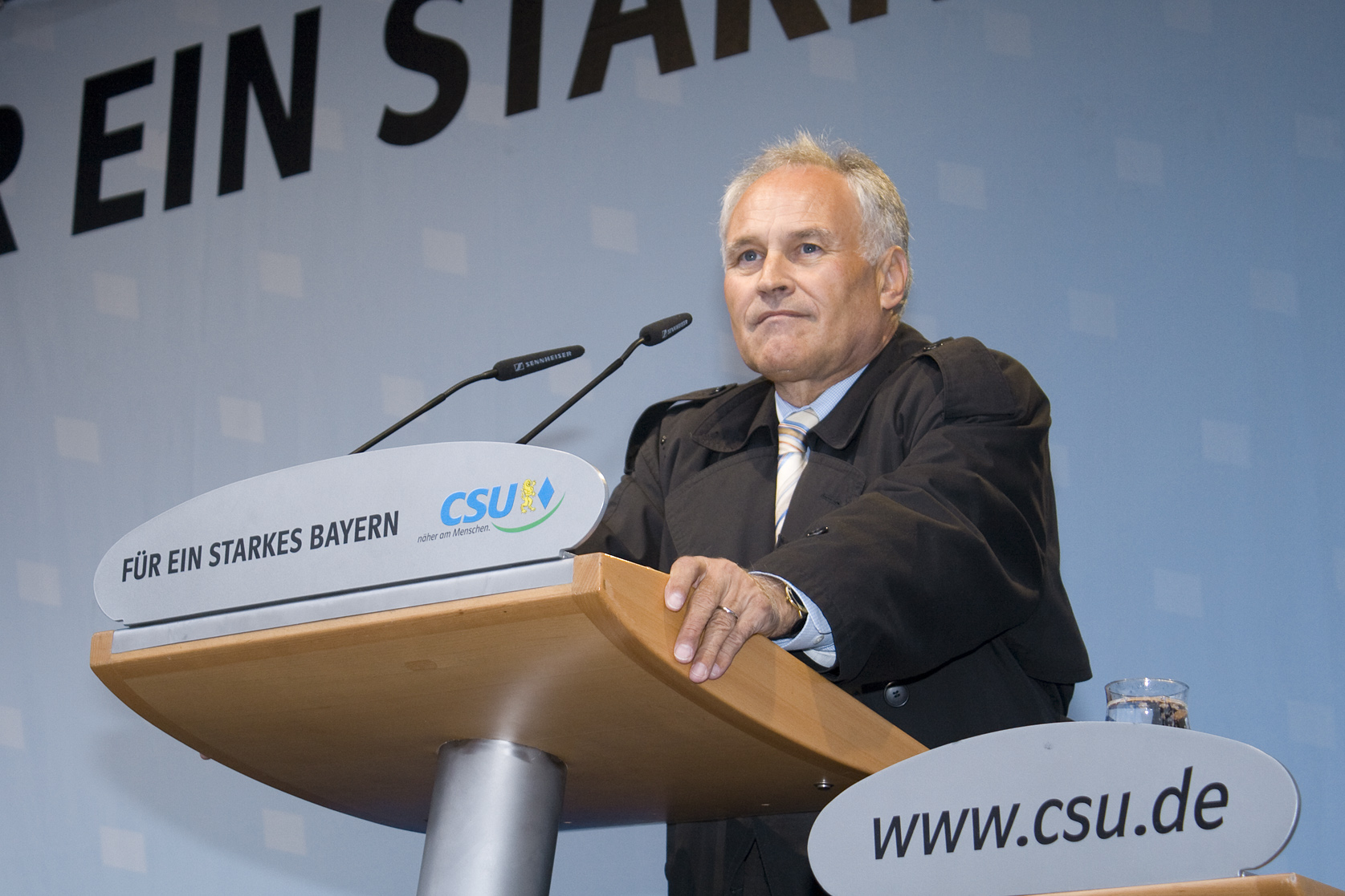 CSU-Politiker Erwin Huber bei einer Wahlkampfrede in Würzburg